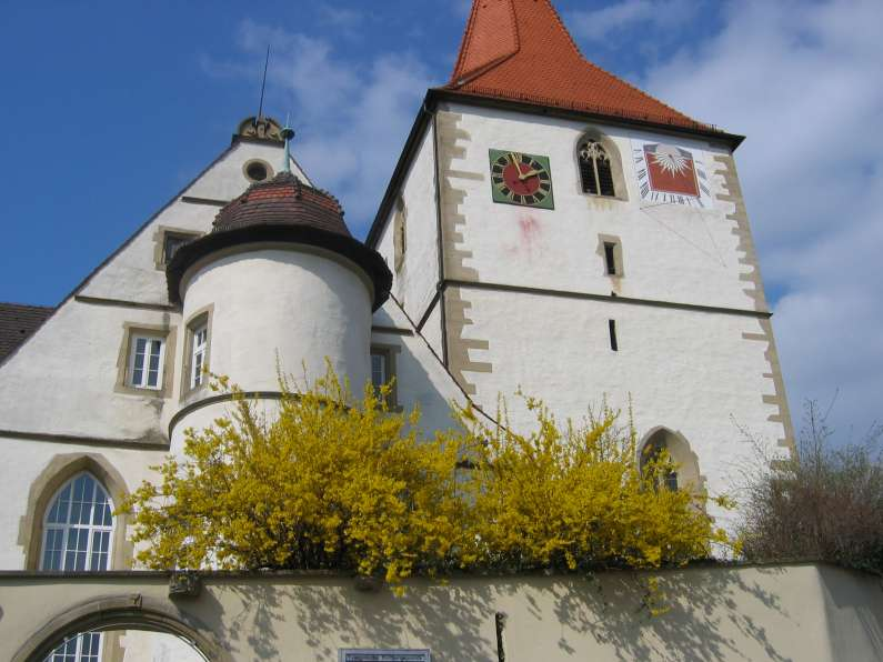 Amanduskirche Freiberg-Beihingen